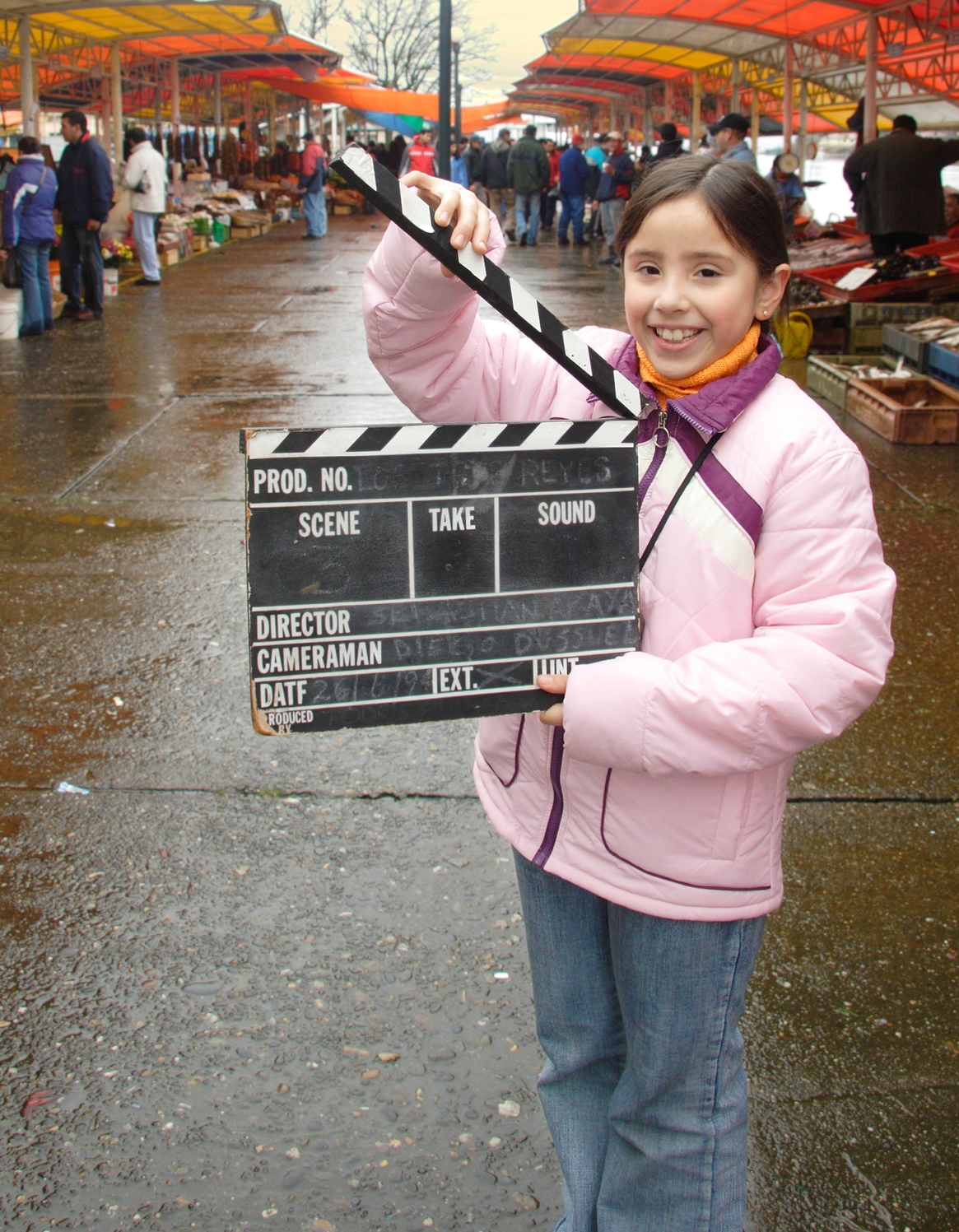 Una niña sostiene una claqueta de madera.